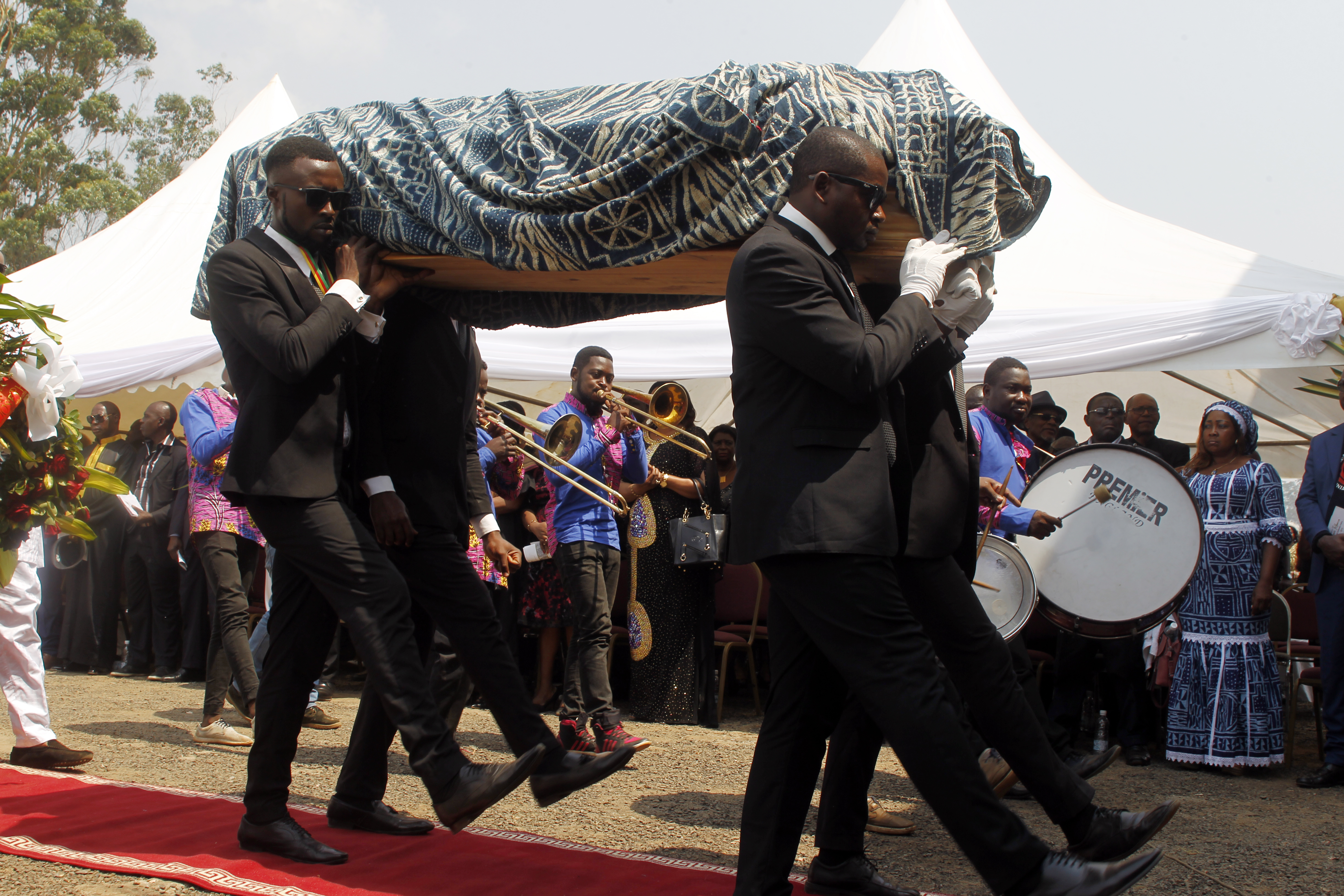 Un corps d’élites spécialisé dans le transport des dépouilles à Bana au Cameroun. This is an image with the theme "Africa on the Move or Transport" from: Cameroon